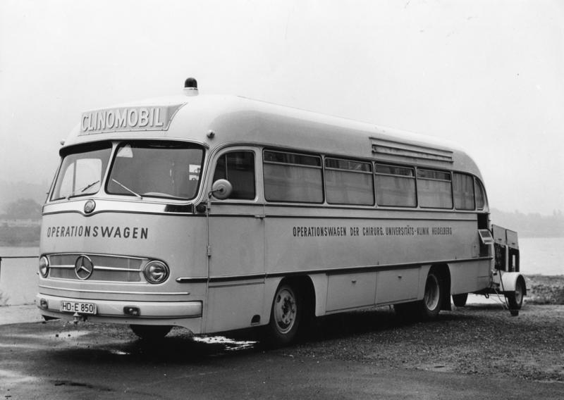 23.5.1957 Operationswagen der Chirurg. Klinik Heidelberg (1. Fahrbarer Operationssaal der Bundesrepublik)